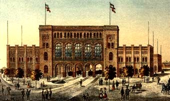 Der Hannöversche Bahnhof in Hamburg-Klostertor wurde für die 1868 bis 1872 errichtete Eisenbahnlinie über Harburg nach Hannover errichtet. Ab 1906 war er nur noch Güterbahnhof. Ab 1941 fanden von dort Judendeportationen statt. Nach Kriegszerstörungen wurde er 1955 abgerissen.